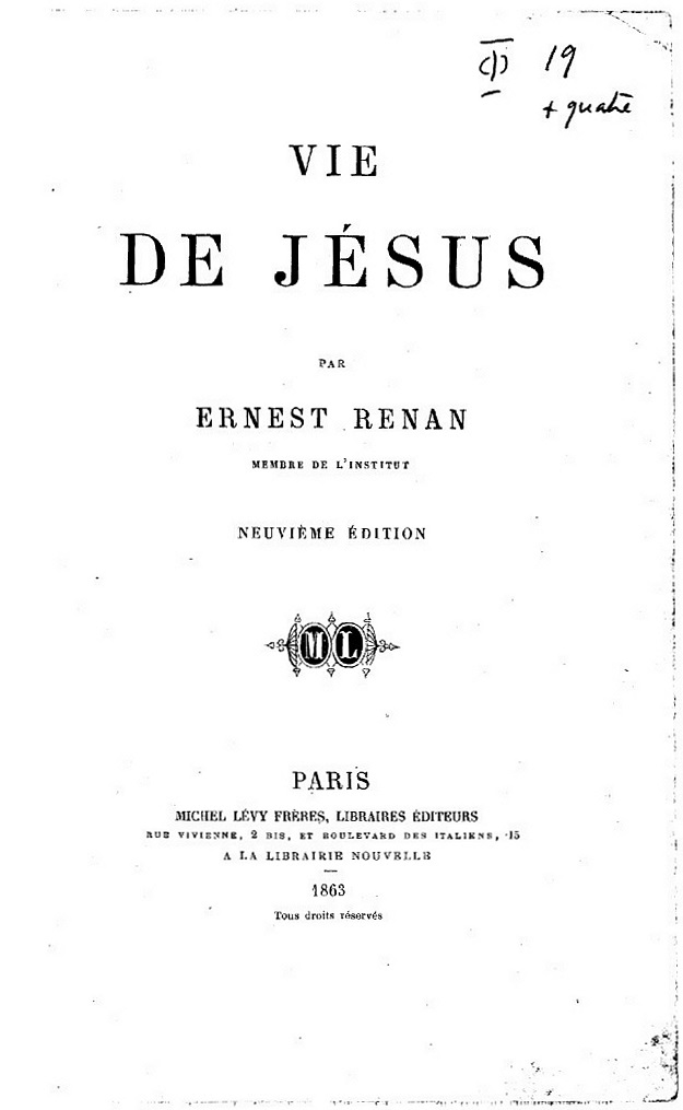 Portada de la obra Vie de Jésus, publicada por Ernest Renan en 1863.